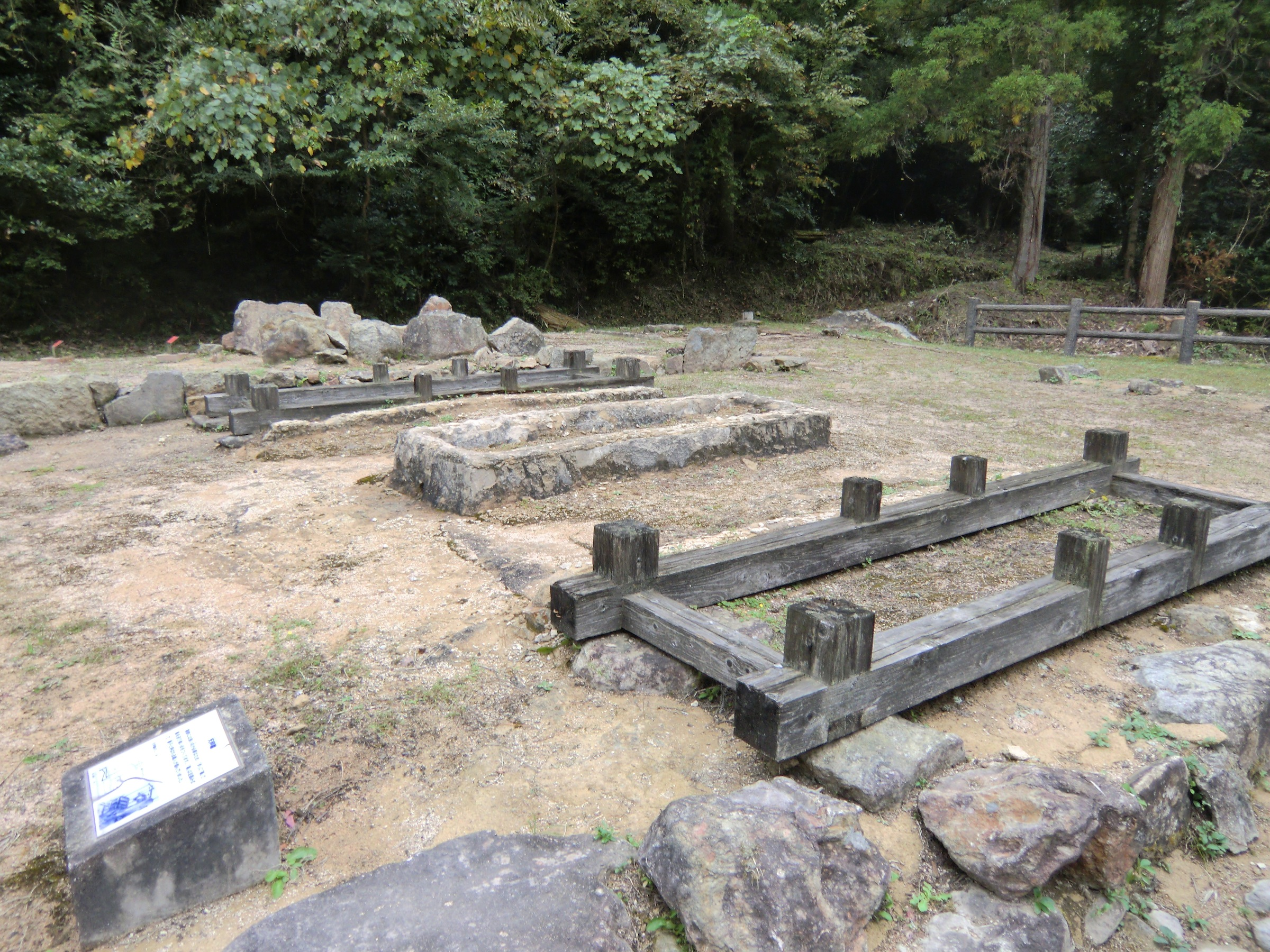 大板山たたら製鉄遺跡（萩市）の製鉄炉と天秤ふいご跡。